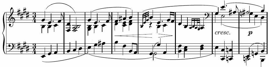 Description : premières mesures du troisième mouvement de la sonate pour piano n° 30 de Beethoven Auteur : propre travail réalisé avec Lilypond Licence : Domaine public (auteur décédé depuis plus de 70 ans)